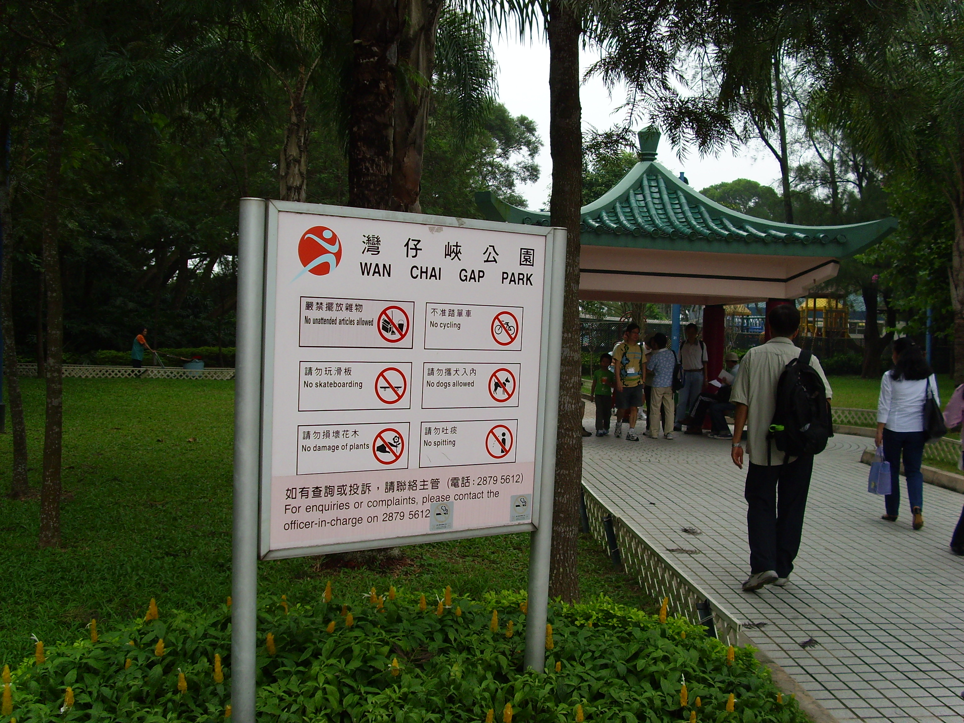 灣仔峽公園